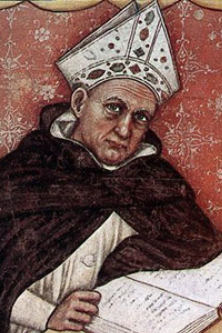 detail